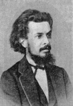 Vasilij Filippovič Troščanskij (1843-1898) - Василий Филиппович Трощанский